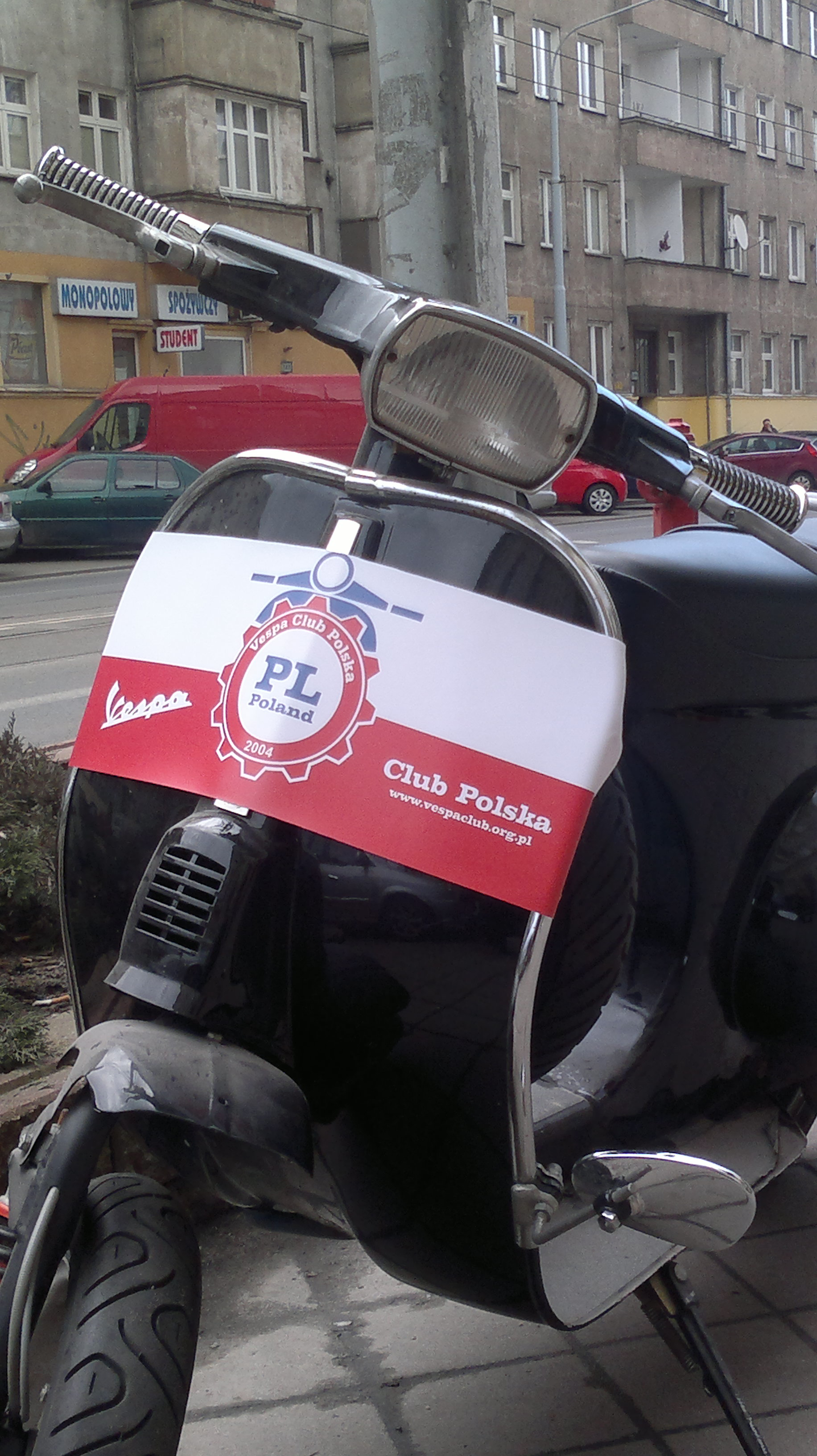 Vespa z banerem klubowym